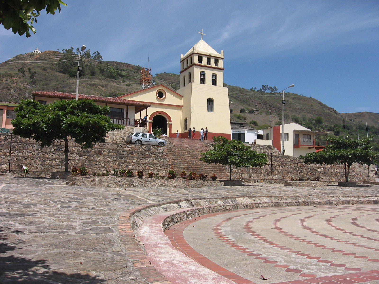 Panoramica de la plaza principal e iglesia del municipio de Tipacoque Boyacá